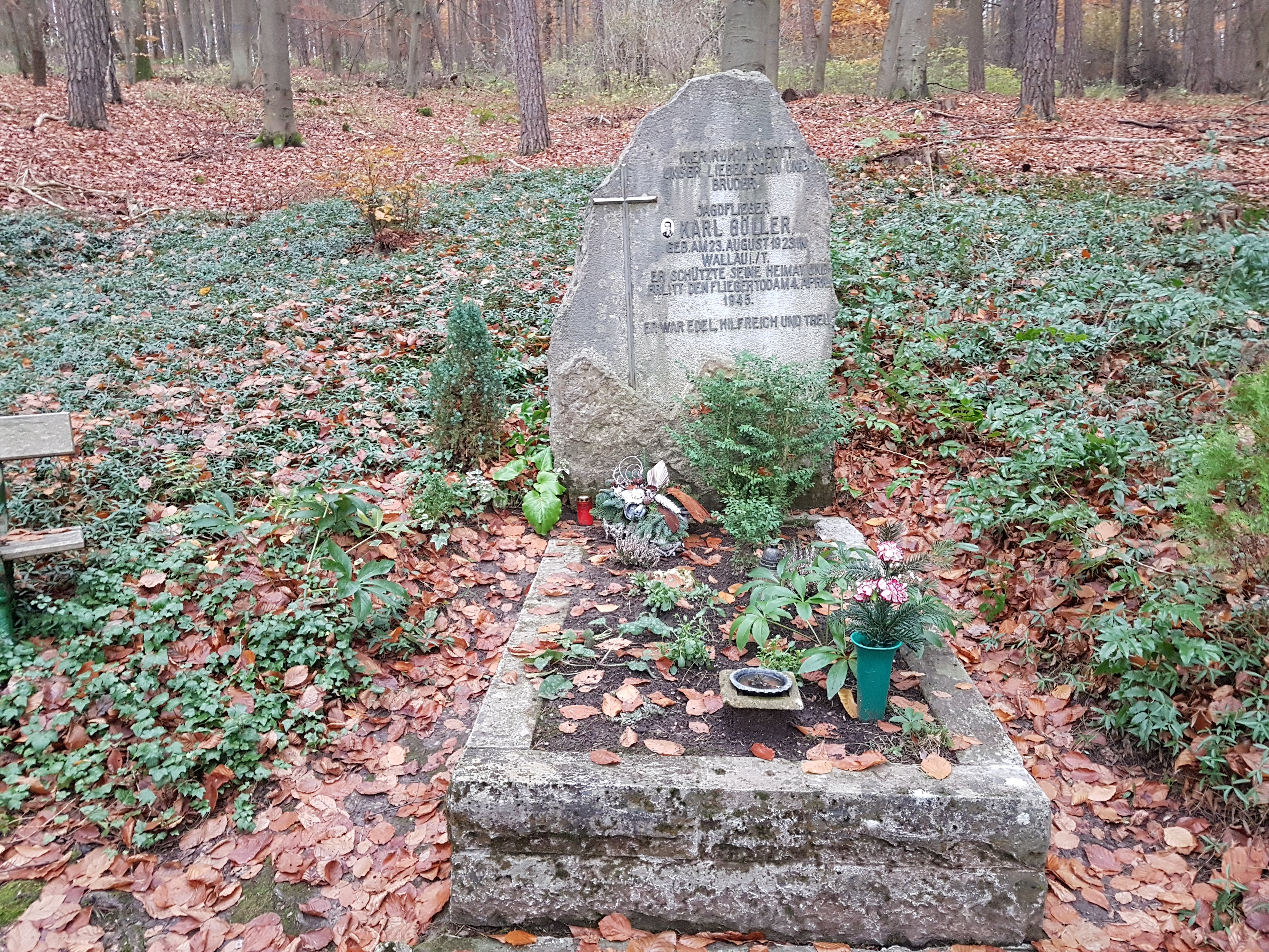 Karl Göller + 4. April 1945. Abschuss durch US Flak bei Tiefangriff auf Fahrzeugkolonne der US Army am Bahnhof Grünsfeld mit Messerschmitt Bf 109 K-4 der 12./JG 53 "Pik As", im Fockenbergwald zw. Kützbrunn und Zimmern, Lkr. Main-Tauber. Uffz Göller war vom Flugplatz 'Neuhausen ob Eck' östlich Tuttlingen gestartet. Literatur: Jochen Prien, Pik As. Geschichte des Jagdgeschwaders 53 Teil 3, Verlag Rogge, 1991.